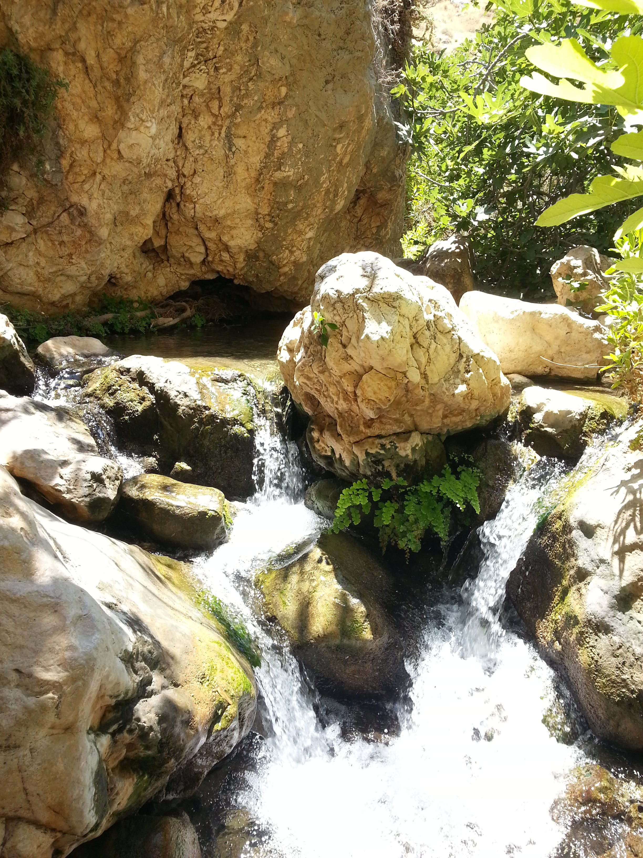 זרימת מים בנחל פרת